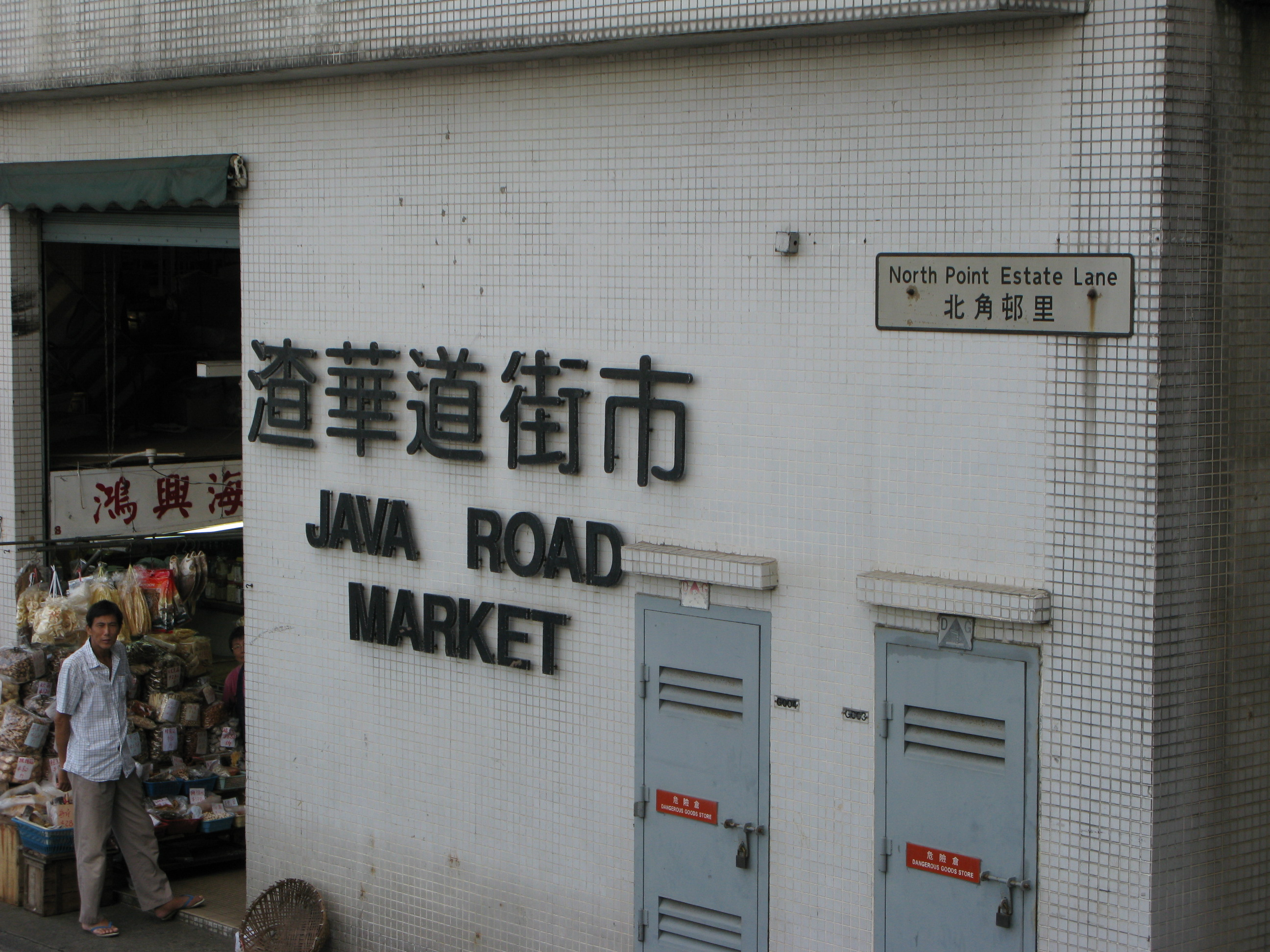 中文（香港）: 北角邨里一景，渣華道街市